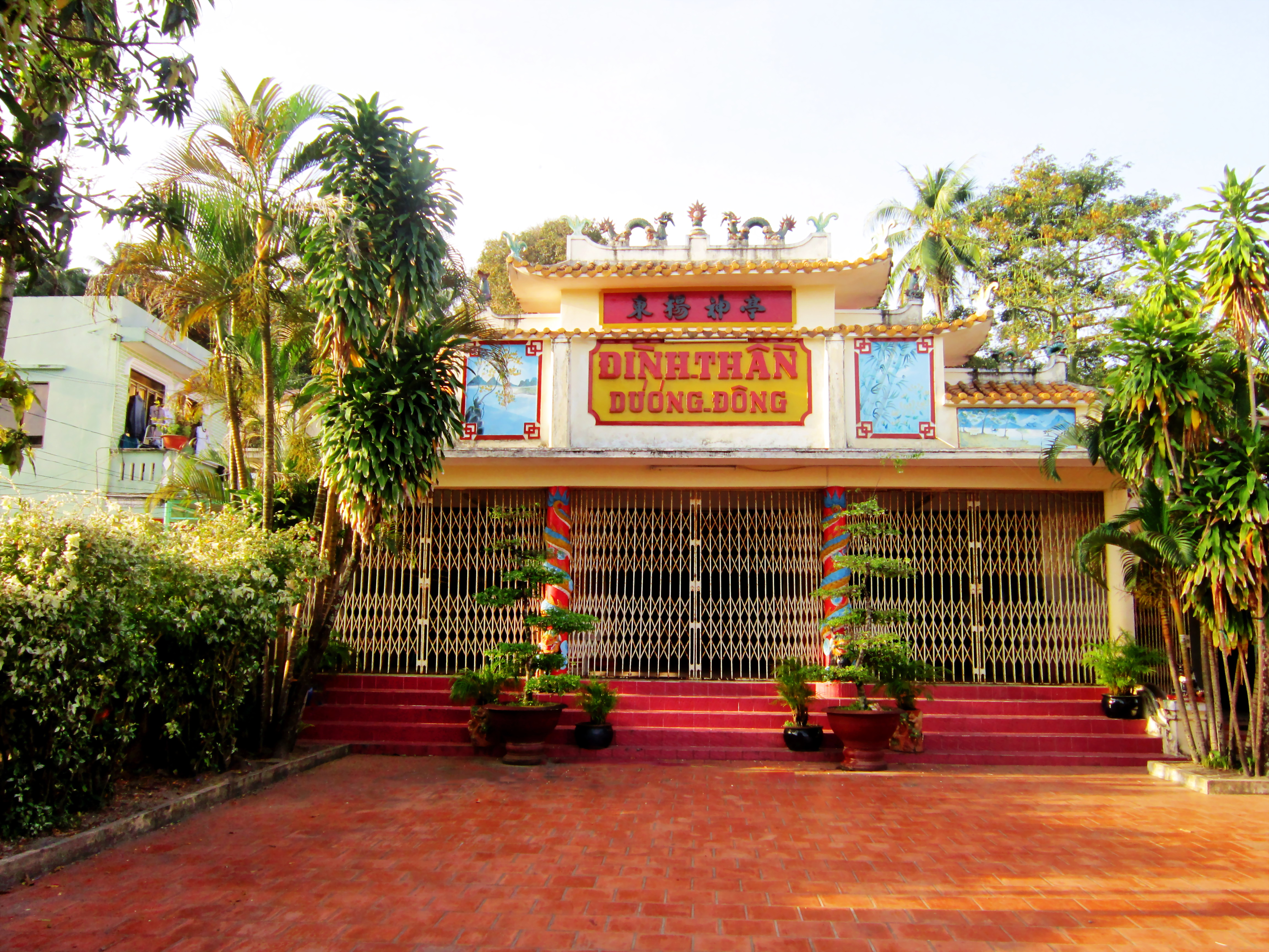 Đình thần Dương Đông tọa lạc trên đường 30 tháng 4, khu phố 1, thị trấn Dương Đông, huyện Phú Quốc, tỉnh Kiên Giang, Việt Nam.